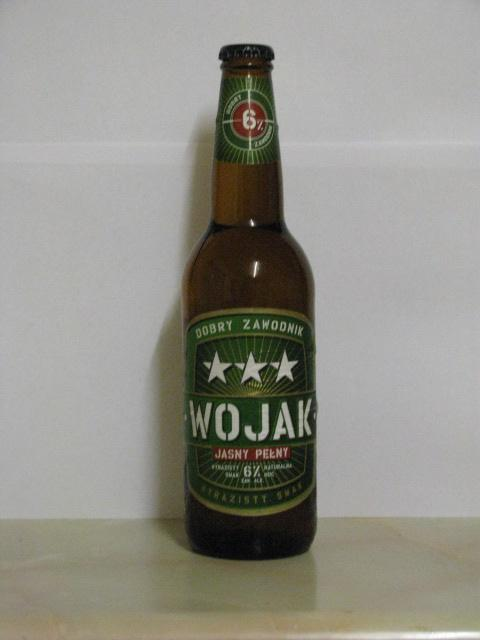 Piwo Wojak